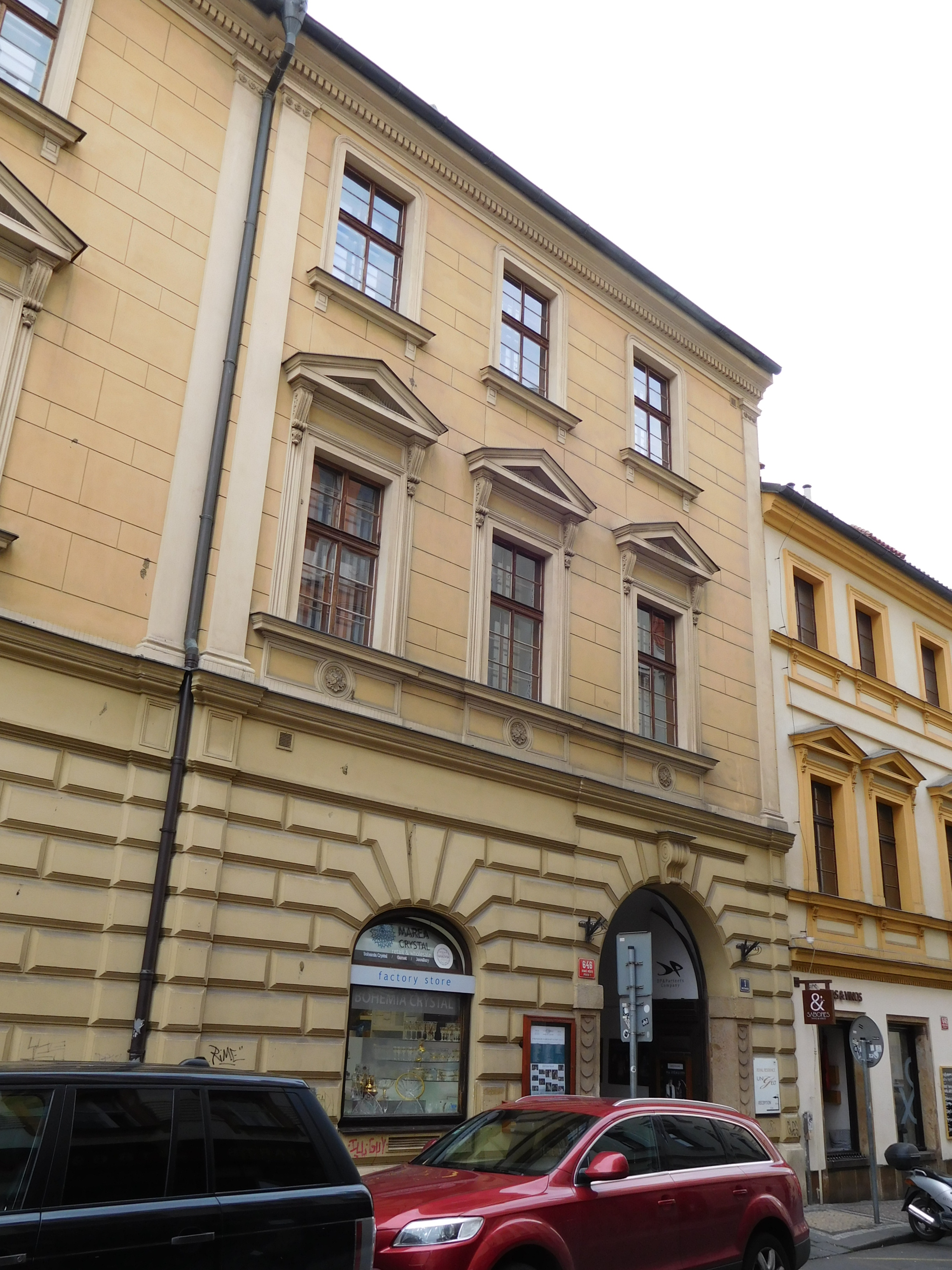 Praha, Staré Město - Ungelt, Divadlo Ungelt (Malá Štupartská 646/1)